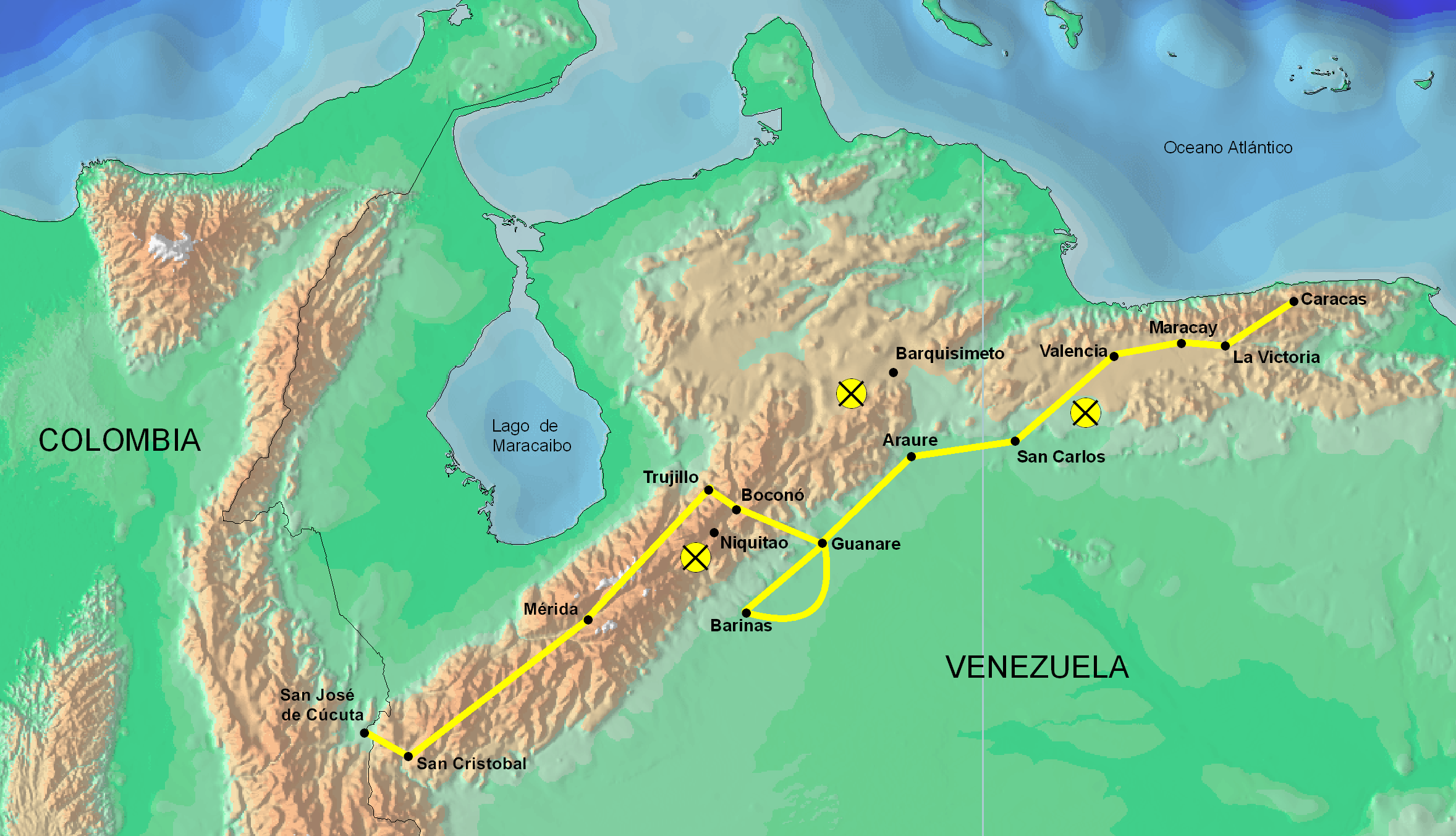 Ruta de la campaña admirable,fue una acción militar enmarcada dentro de la Guerra de Independencia de Venezuela.